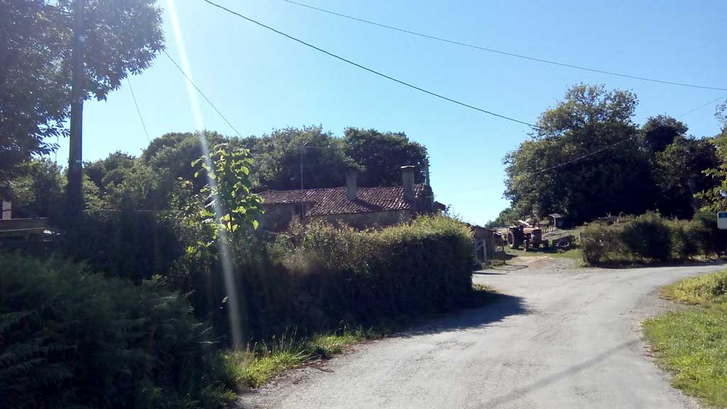 Vista da Cabana, Curtis.